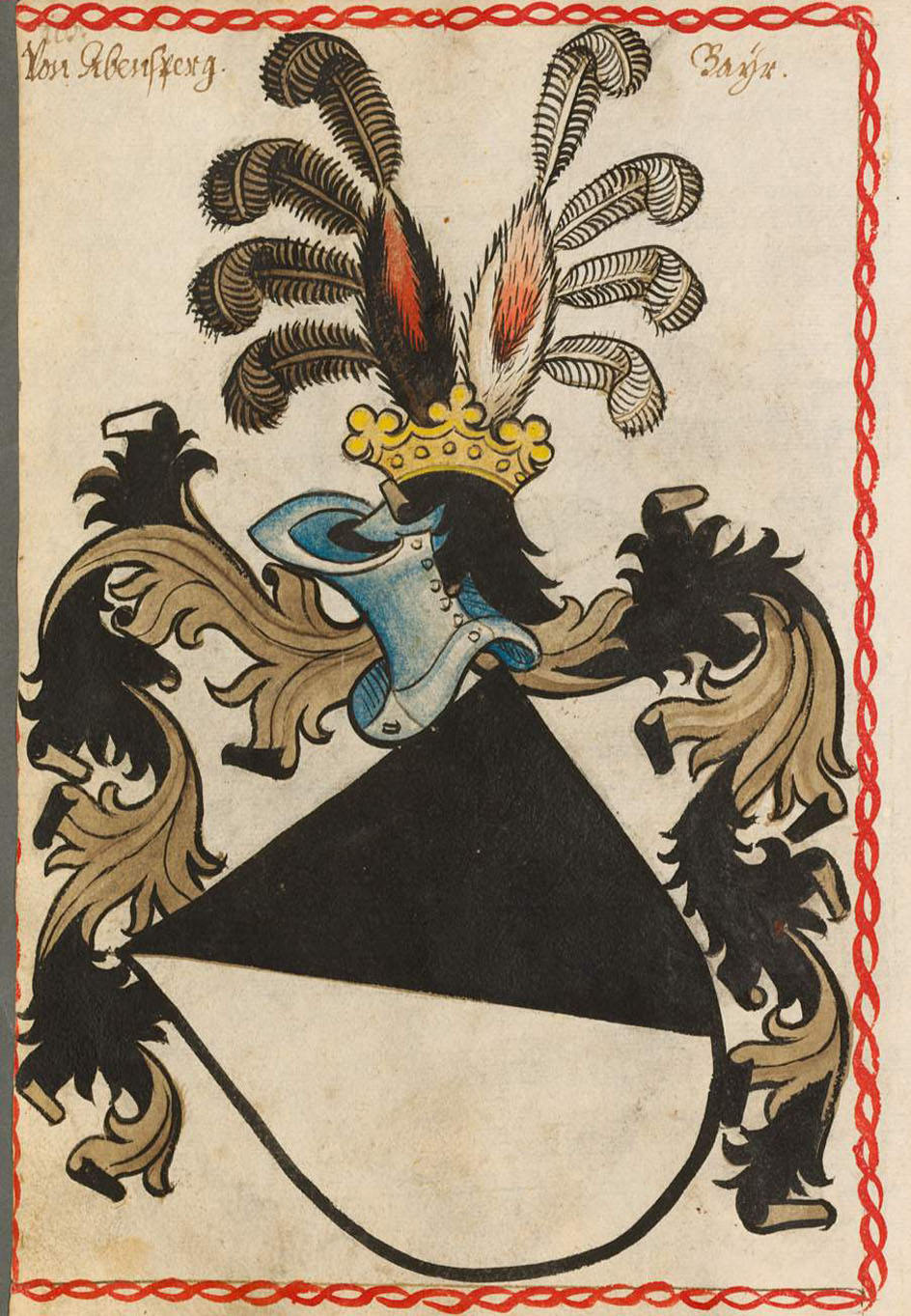 Scheibler'sches Wappenbuch , älterer Teil; Seite 18 Von Abensperg Bayr